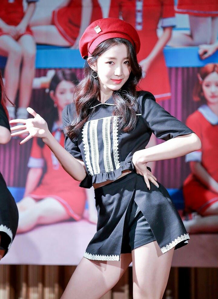 171117 구구단 하나 영등포 팬사인회